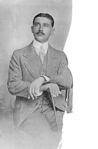 Guálter Martiniano de Alencar Araripe, primeiro e único barão de Exu (Exu, 18 de junho de 1822 — Exu, 22 de julho de 1889)